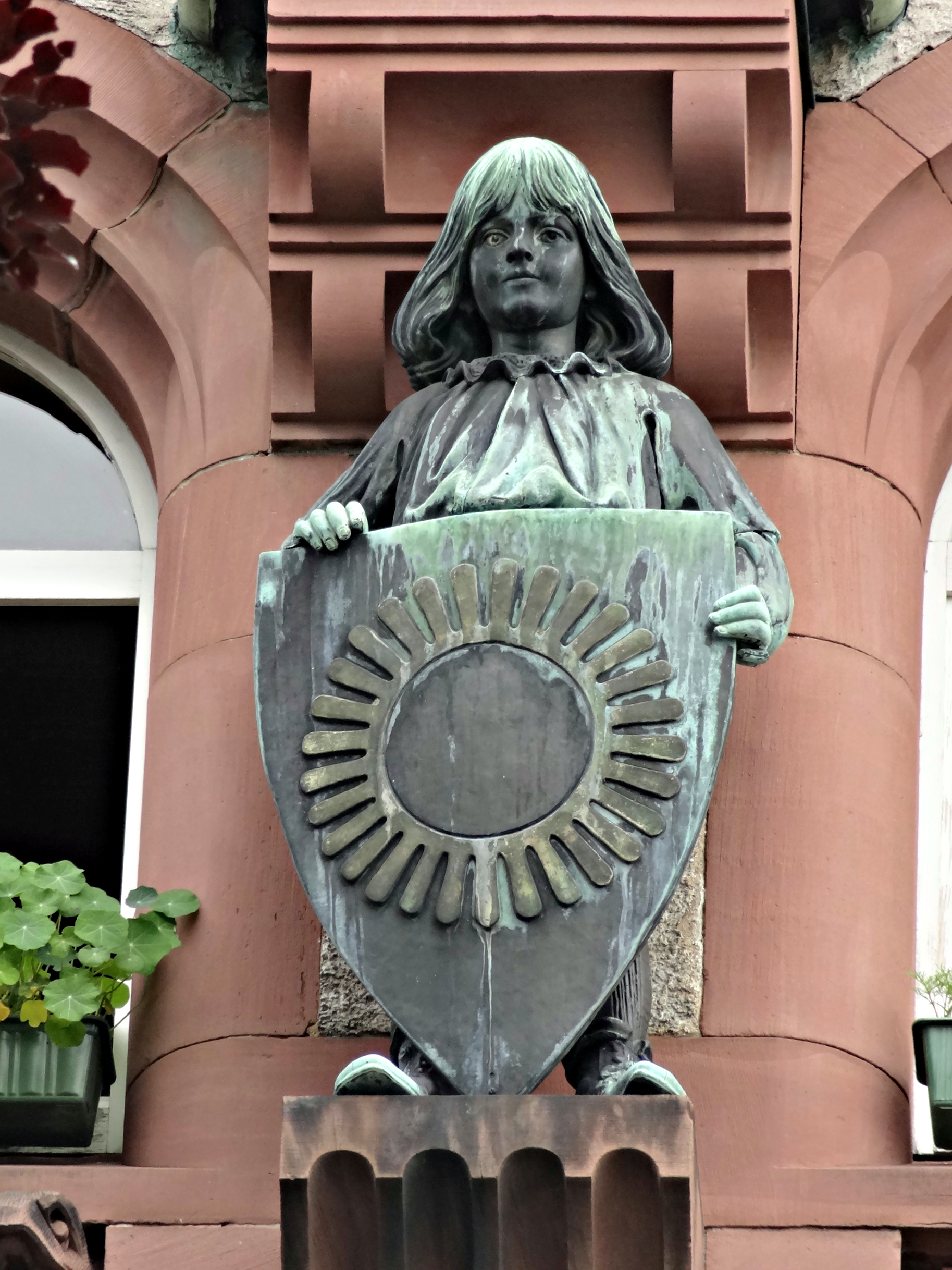 Haus Haardteck, Herdweg 79 in Darmstadt